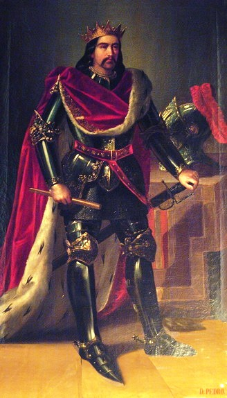 Retrato imaginario del rey Pedro II de Aragón (1178-1213), que fue hijo del rey Alfonso II de Aragón y de la reina Sancha de Castilla.